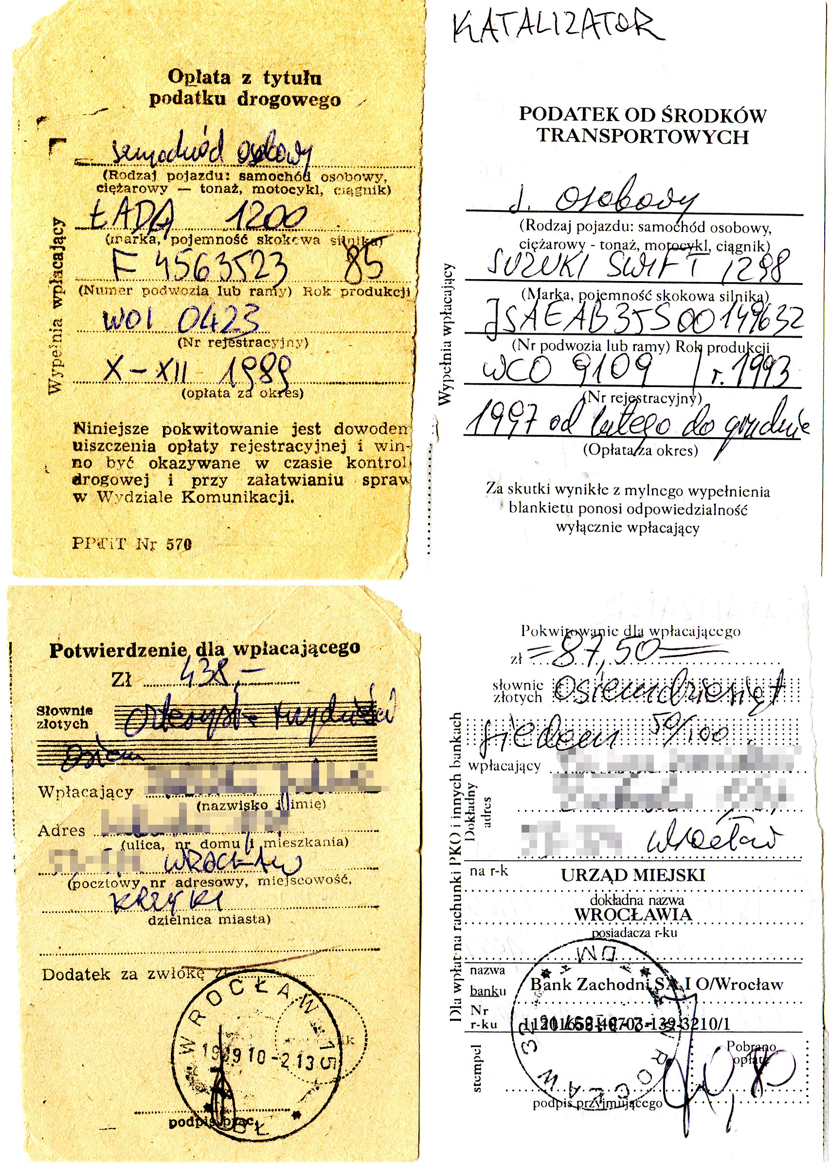 dowód wpłaty: za podatek drogowy (samochód osobowy, pojemność silnika 1200 cm3, za rok 1989 (po lewej) za podatek od środków transportowych (samochód osobowy, pojemność silnika 1298 cm3, za rok 1997 (po prawej)